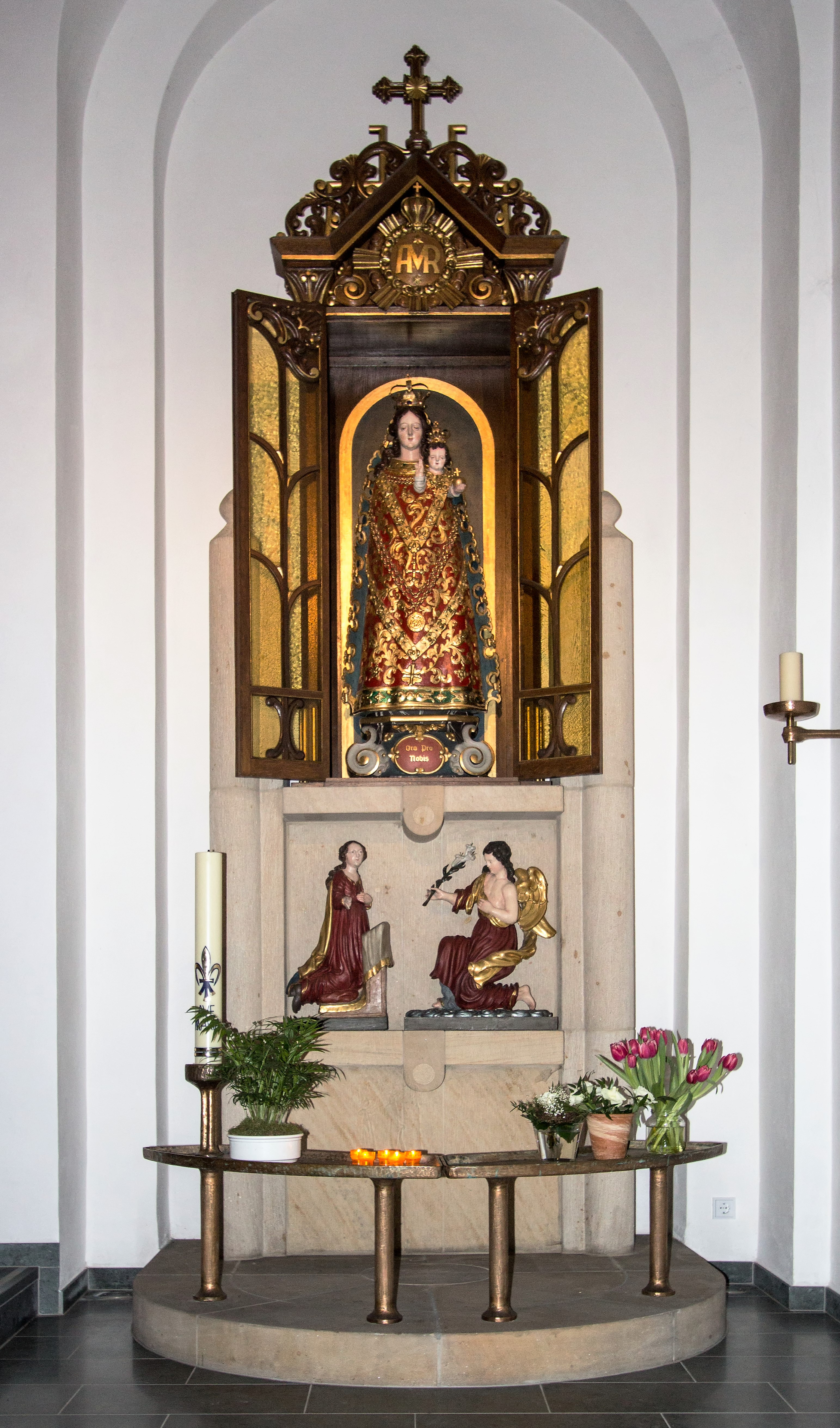 Gnadenbild in der St. Joseph-Pfarrkirche in Paderborn-Marienloh